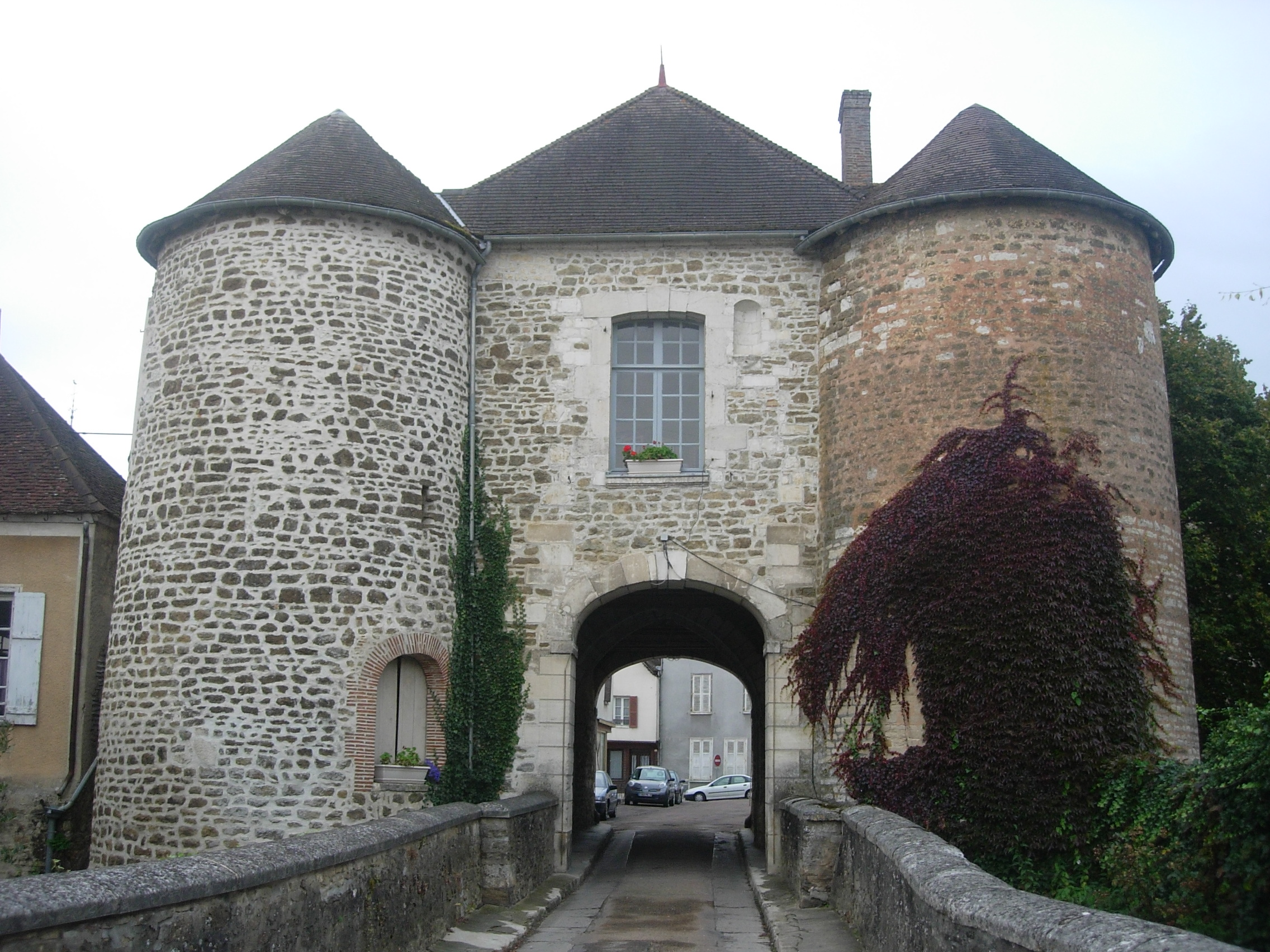 Porte médiévale d'Ervy-le-Châtel (Aube)